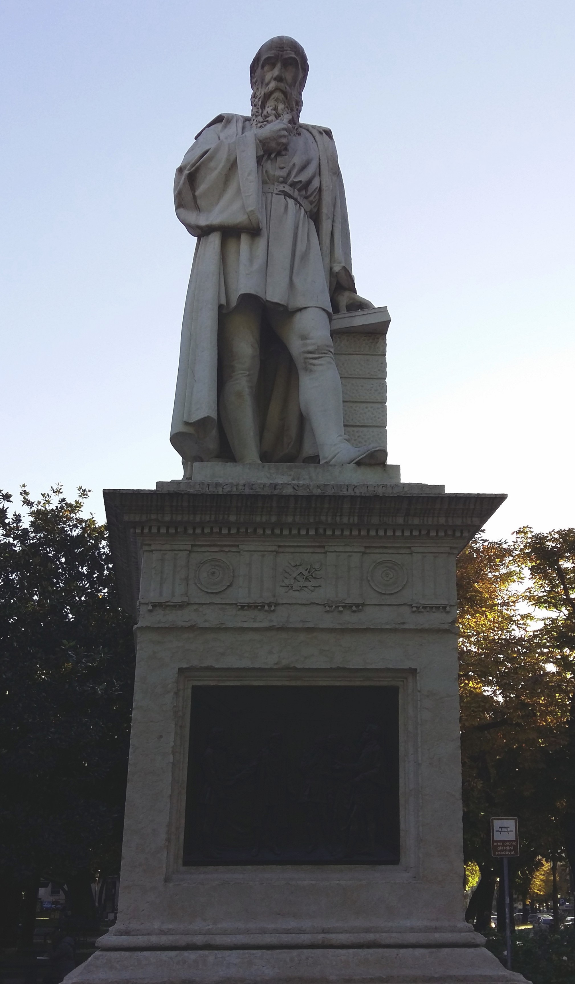 Statua dell'Architetto Michele Sanmicheli a Verona, in via Porta Nuova